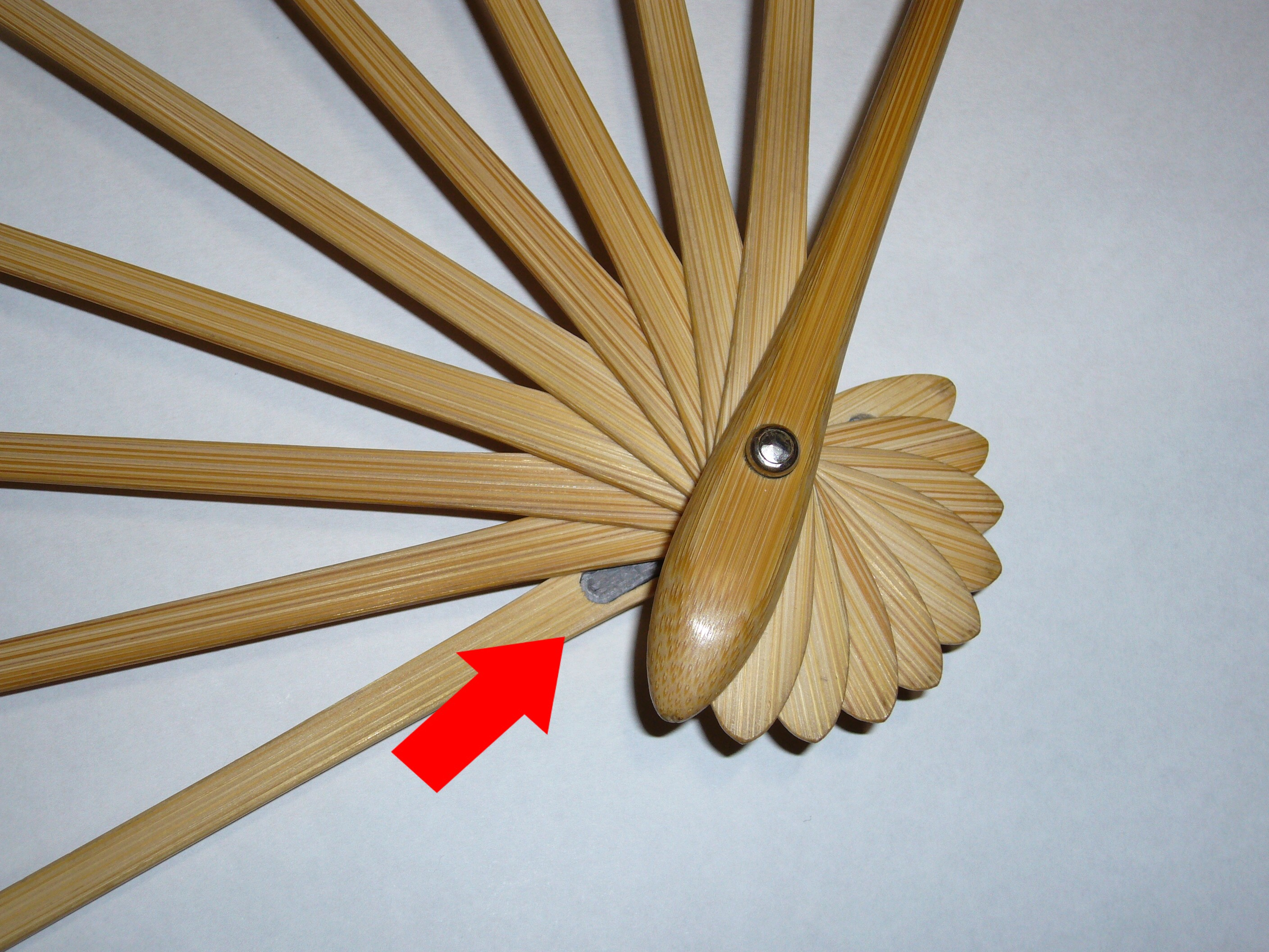 日本舞踊に使われる舞扇（まいおうぎ）。Japanese dancing Fan.